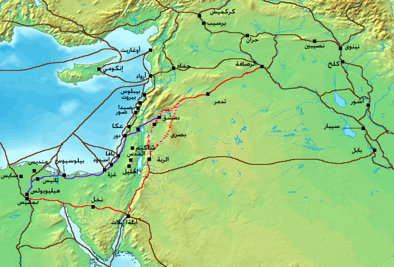 طريق الملوك (بالأحمر)، وطريق البحر (بالأرجواني) بين مجموعة من طرق بلاد الشام القديمة عام 1300 ق.م